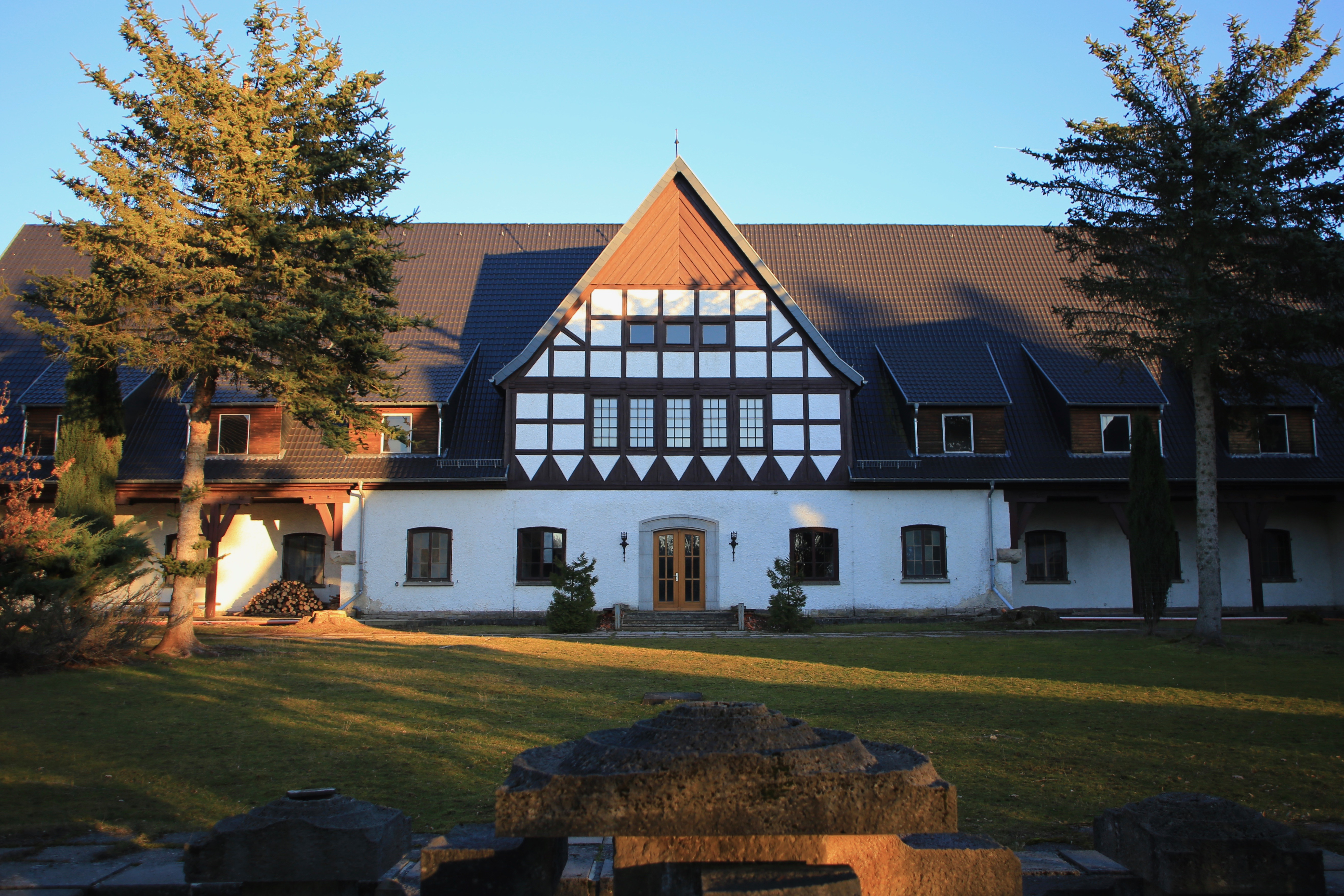 Hauptbau mit zentralem Zwerchgiebel über Mittelrisalit und weit herabgezogenem Satteldach flankiert von je einem giebelständigen Seitenflügel in Fachwerkoptik mit Satteldach und breiten Schleppgraupen. Sichtbares Fachwerk der Geibeldreiecke konstruktives Gefüge mit Fußbändern in Andreaskreuzverstrebung und Fußwinkelhölzern im Brüstungsbereich. Erdgeschoß massiv mit regelmäßig angeordneten Flachbogenfenstern und Türen sowie passenden Fensterläden.